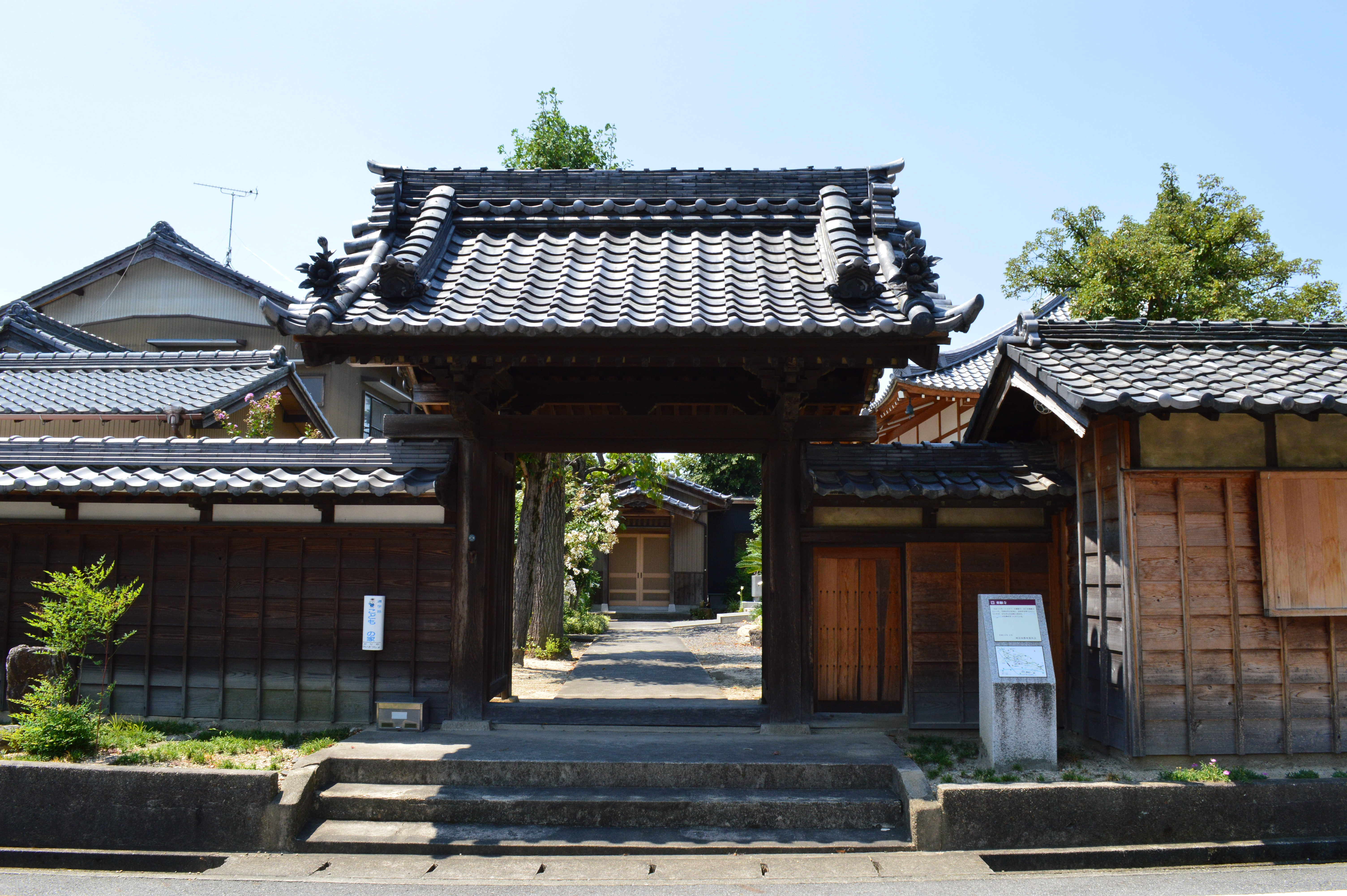 愛知県刈谷市にある乗願寺